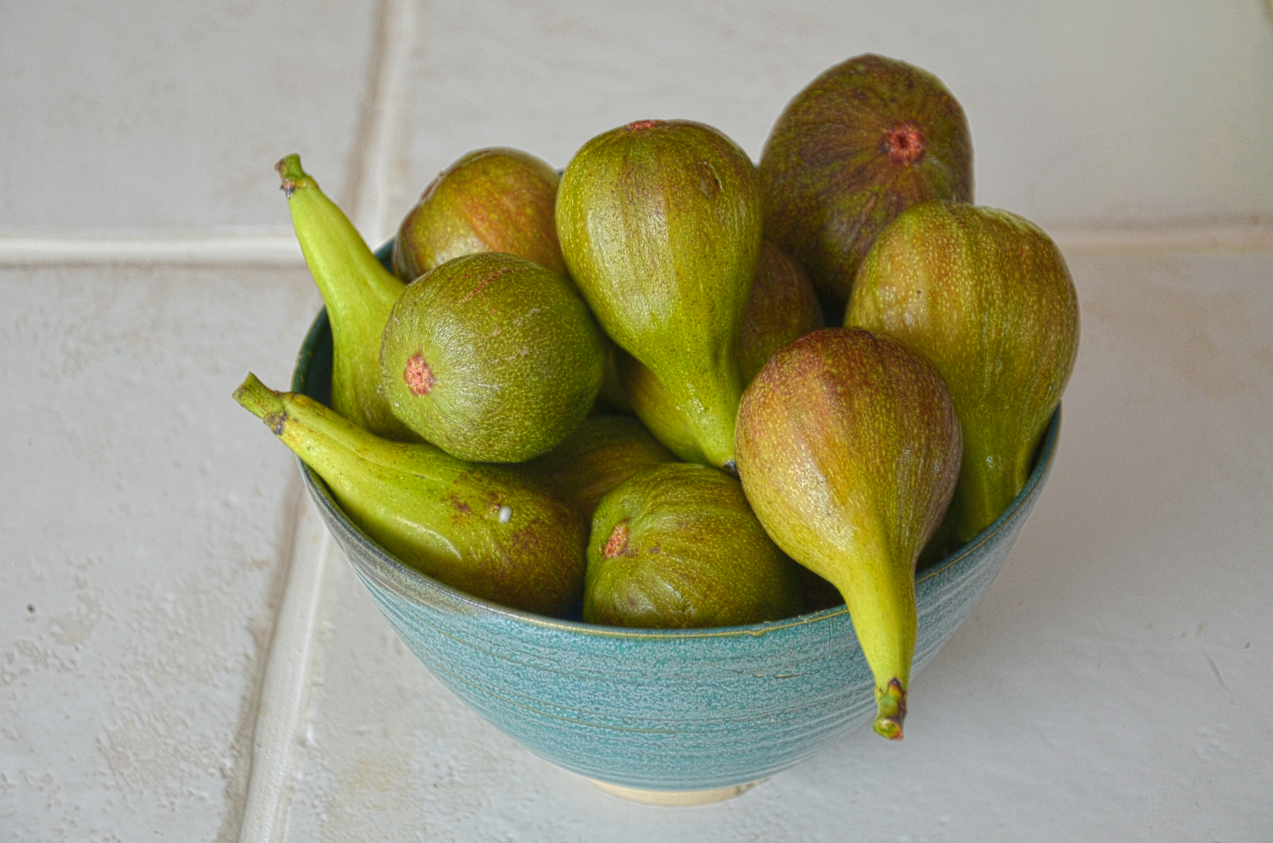 Des figues fraîches dans une coupe.